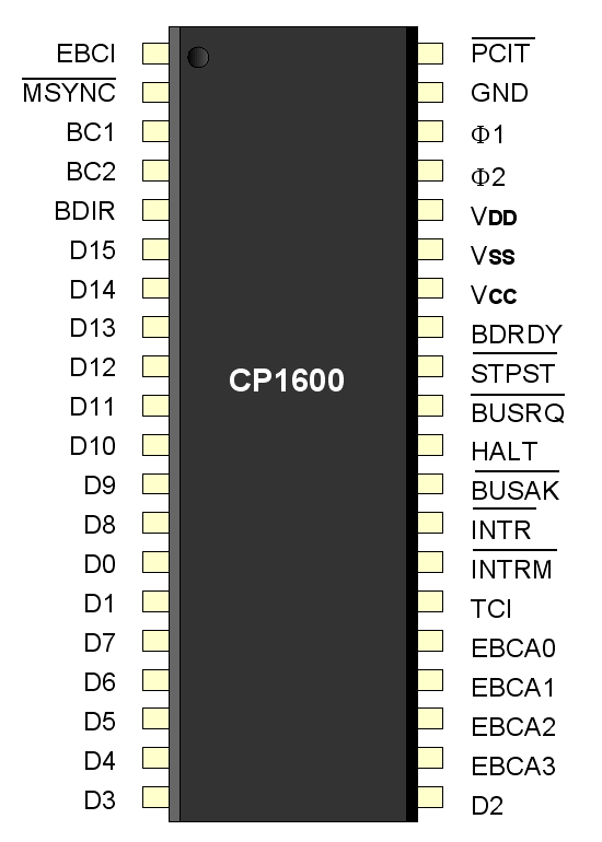 Patillaje del CP6100